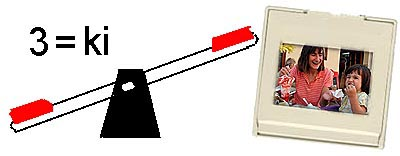 Bilderrätsel (Beispiel) Bilderrätsel Die Lösung lautet: Wikipedia Lösungsweg: erster Begriff „Wippe“, den dritten Buchstaben (p) durch „ki“ ersetzen, ergibt Wikipe; zweiter Begriff „Dia“; beide Begriffe zusammensetzen selbst gebastelt Urheber Benutzer:Matthias Urheberrechtlicher Status frei verfügbar